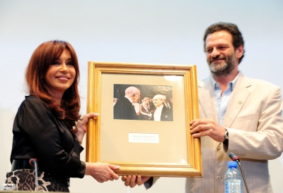 Presidenta junto al el director de la Fundación Instituto Leloir, Fernando Goldbaum, durante la inauguración del Simposio Internacional de Células Madre